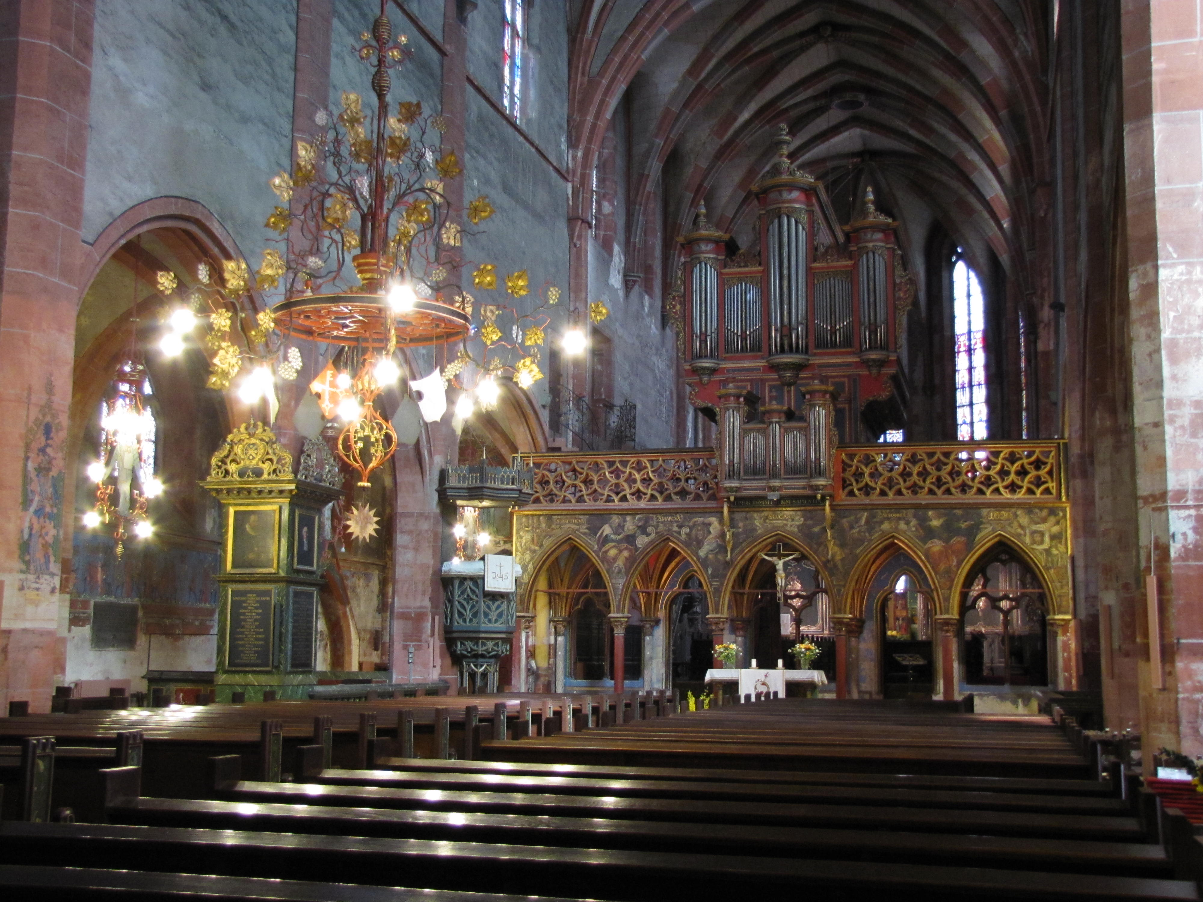 Alsace, Bas-Rhin, Église protestante Saint-Pierre-le-Jeune de Strasbourg (PA00085030): Vue intérieure de la nef vers le jubé et le chœur. Orgue Jean-André Silbermann (1780): This object is classé Monument Historique in the base Palissy, database of the French furniture patrimony of the French ministry of culture, under the references PM67001136 and buffet PM67000505 buffet.